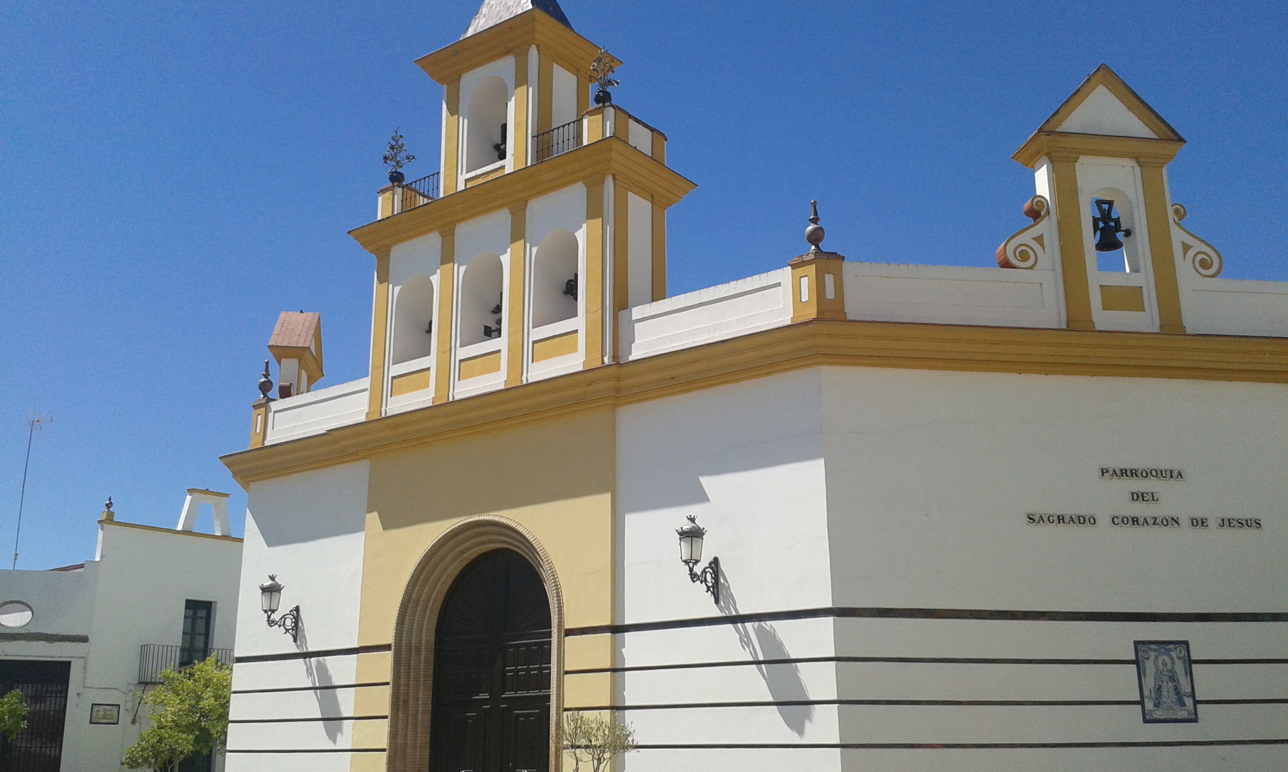 Capilla